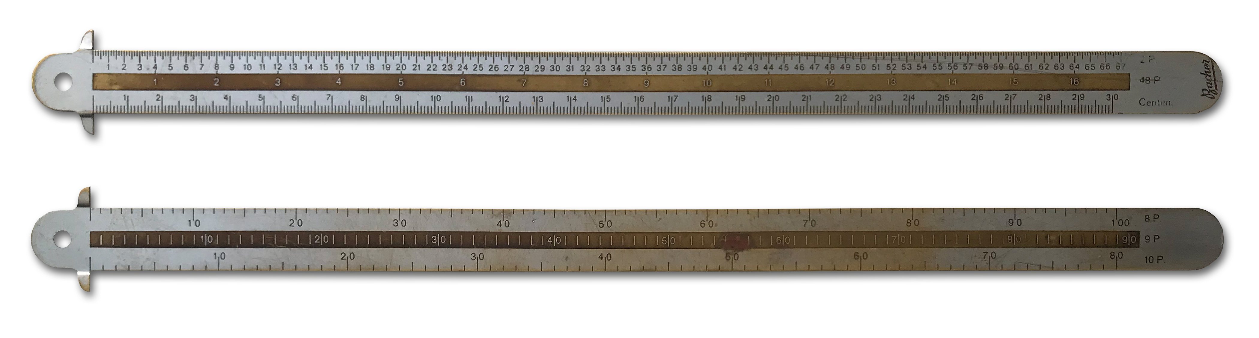 Typometer für das grafische Gewerbe